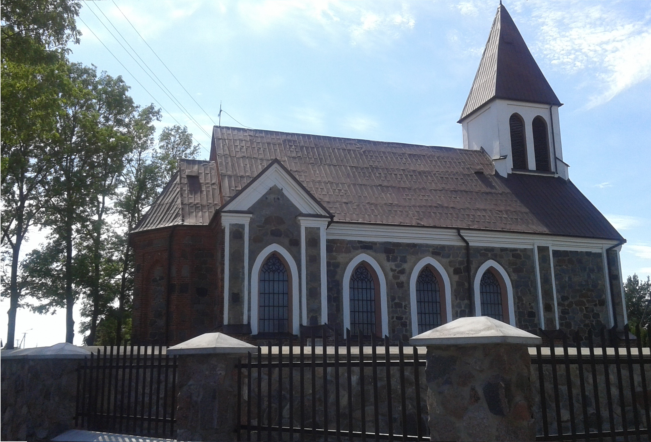 Kościół parafialny pw. św. Stanisława BM w Zarębach Kościelnych